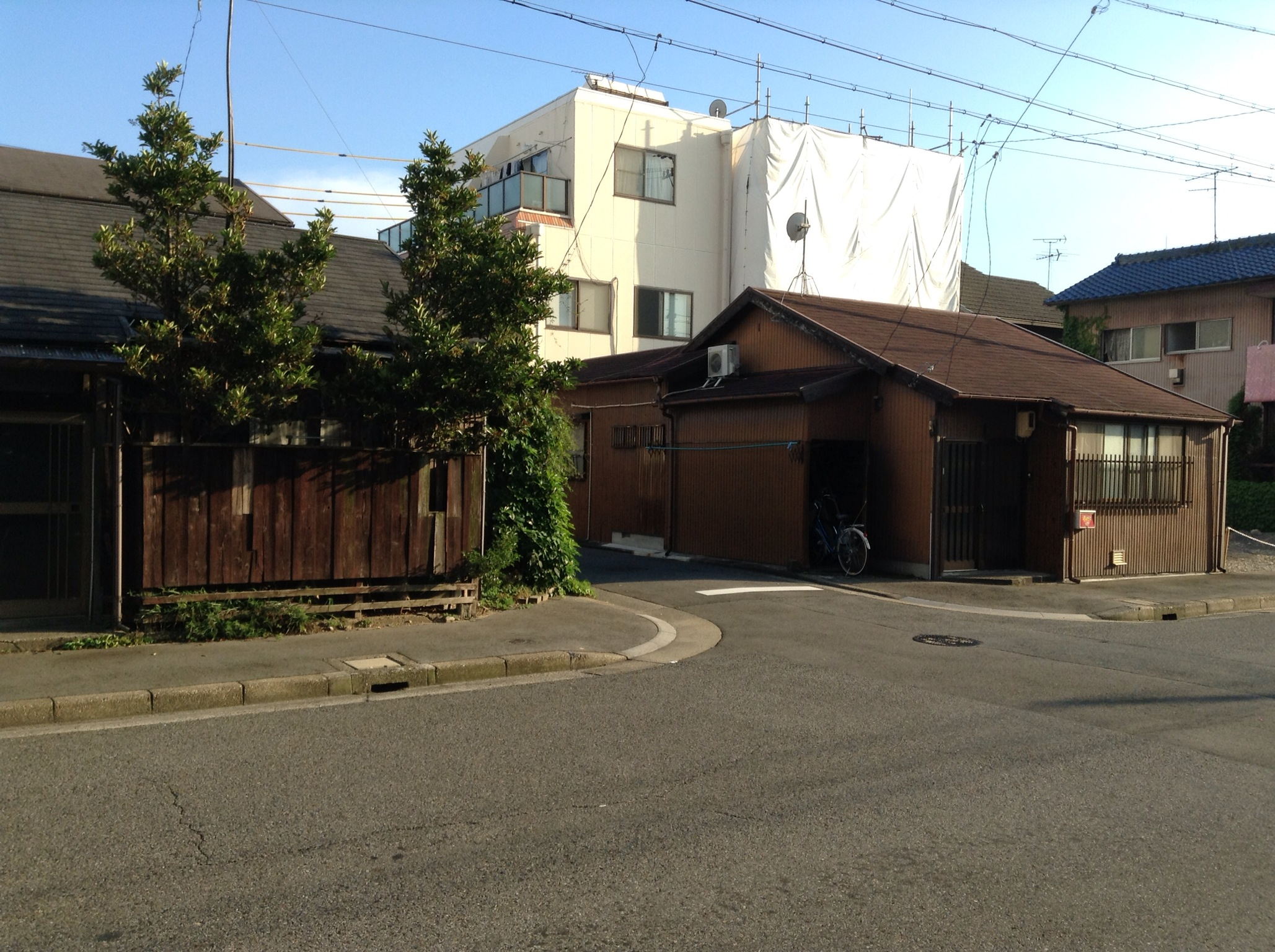 名古屋市北区浪打町の浪打住宅を北側公道東側より撮影